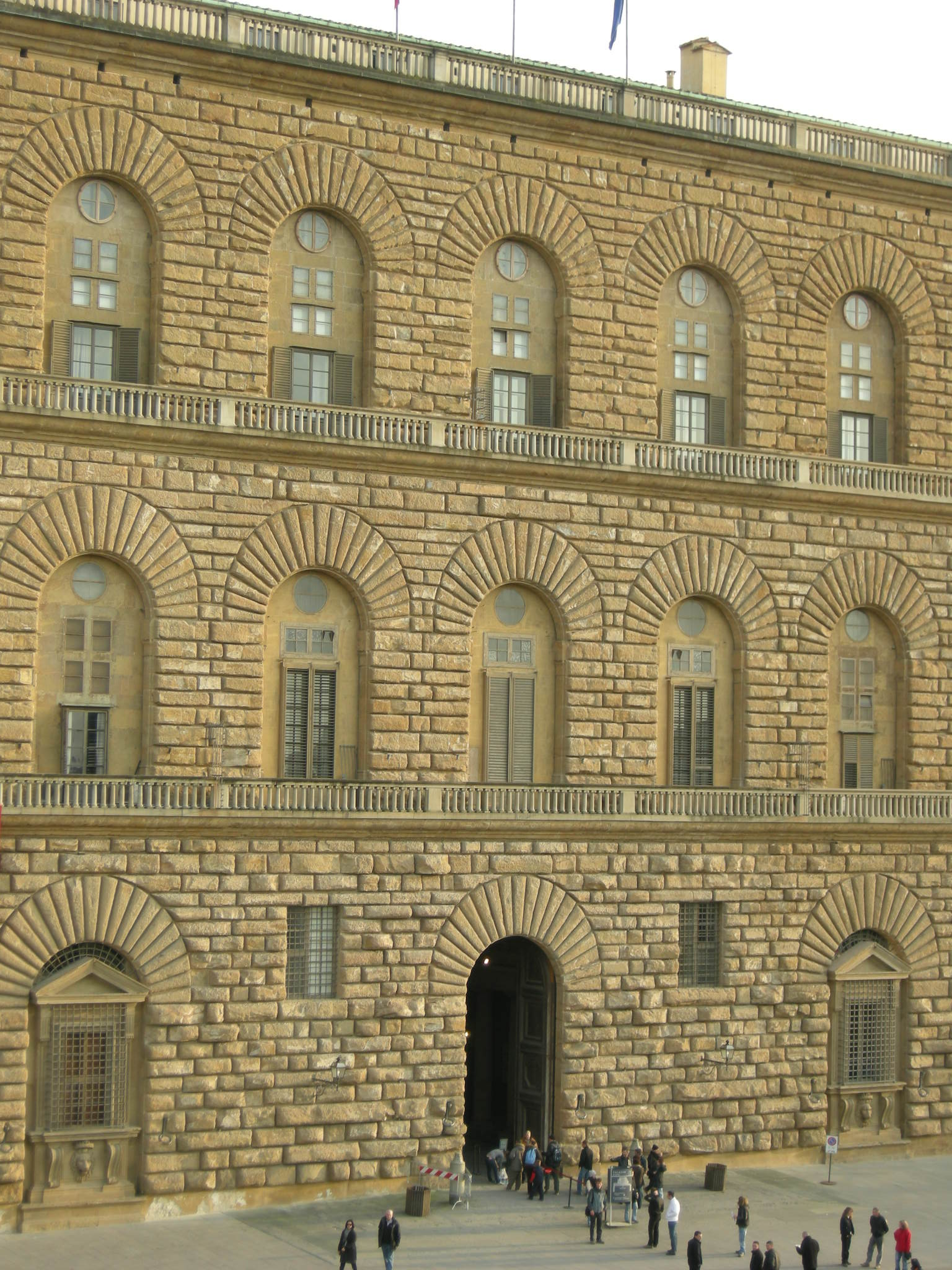 Palazzo pitti facciata